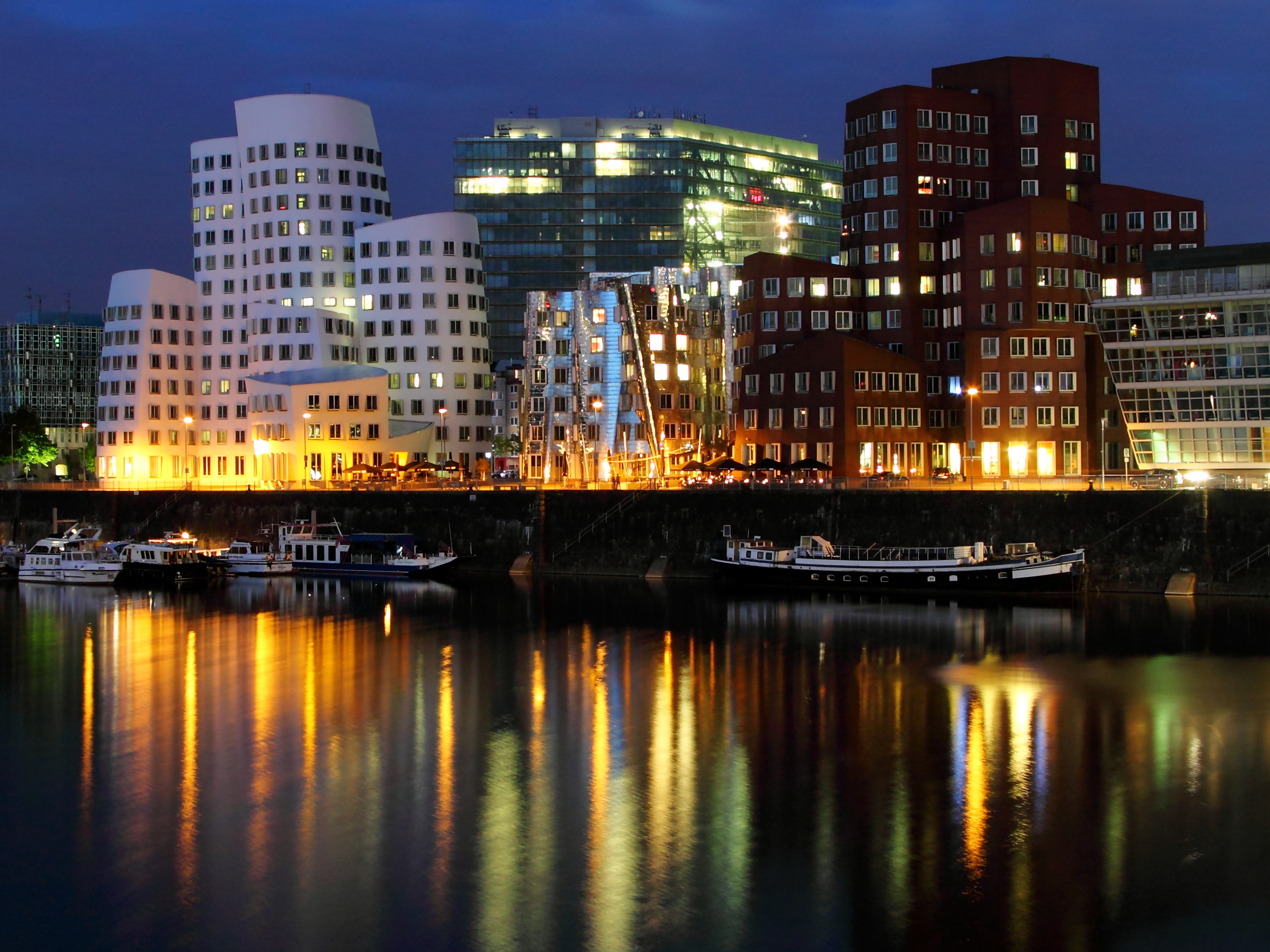 Medienhafen Düsseldorf bei Nacht